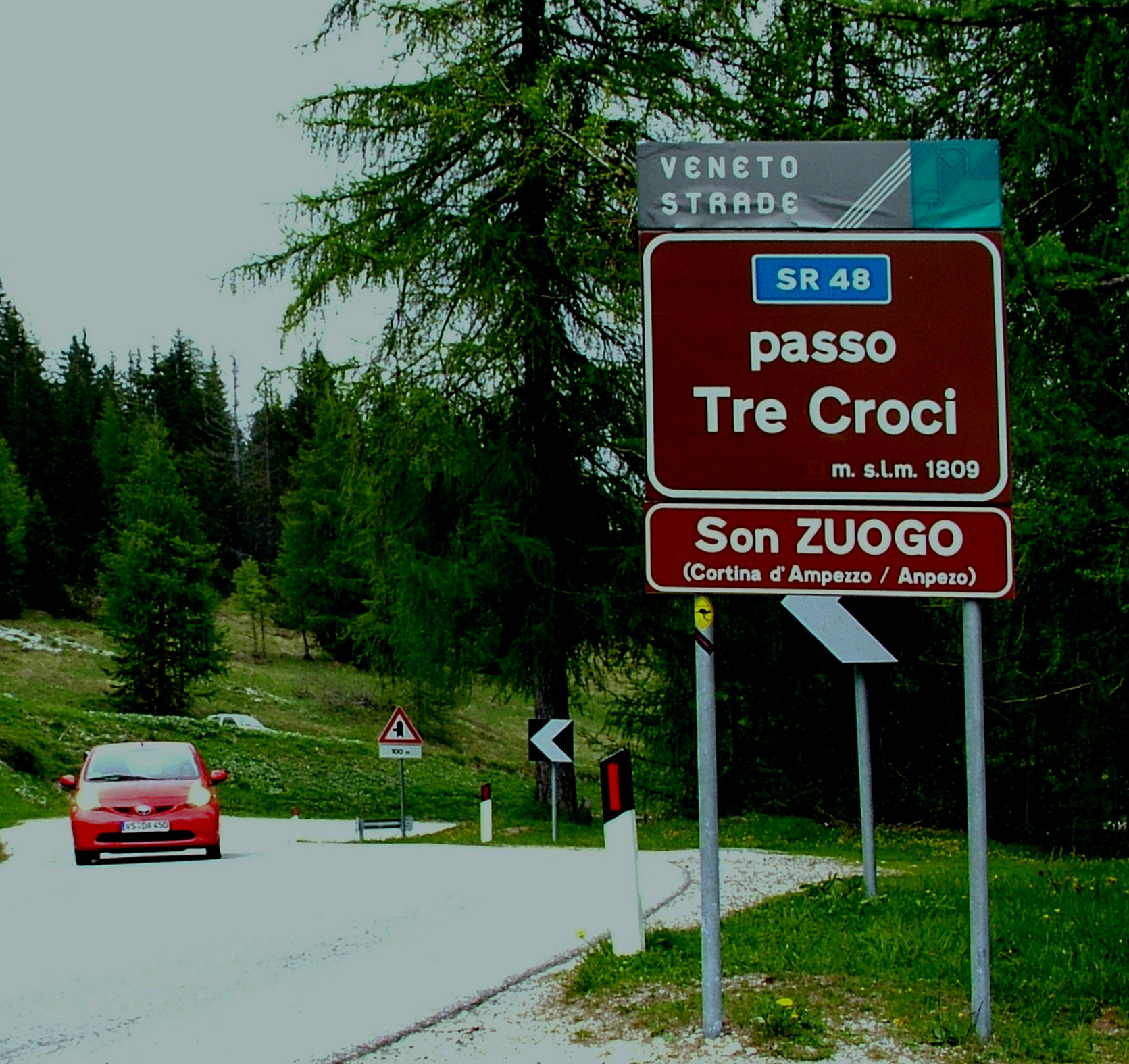 Dolomitok: Tre Croci-hágó (Olaszország)